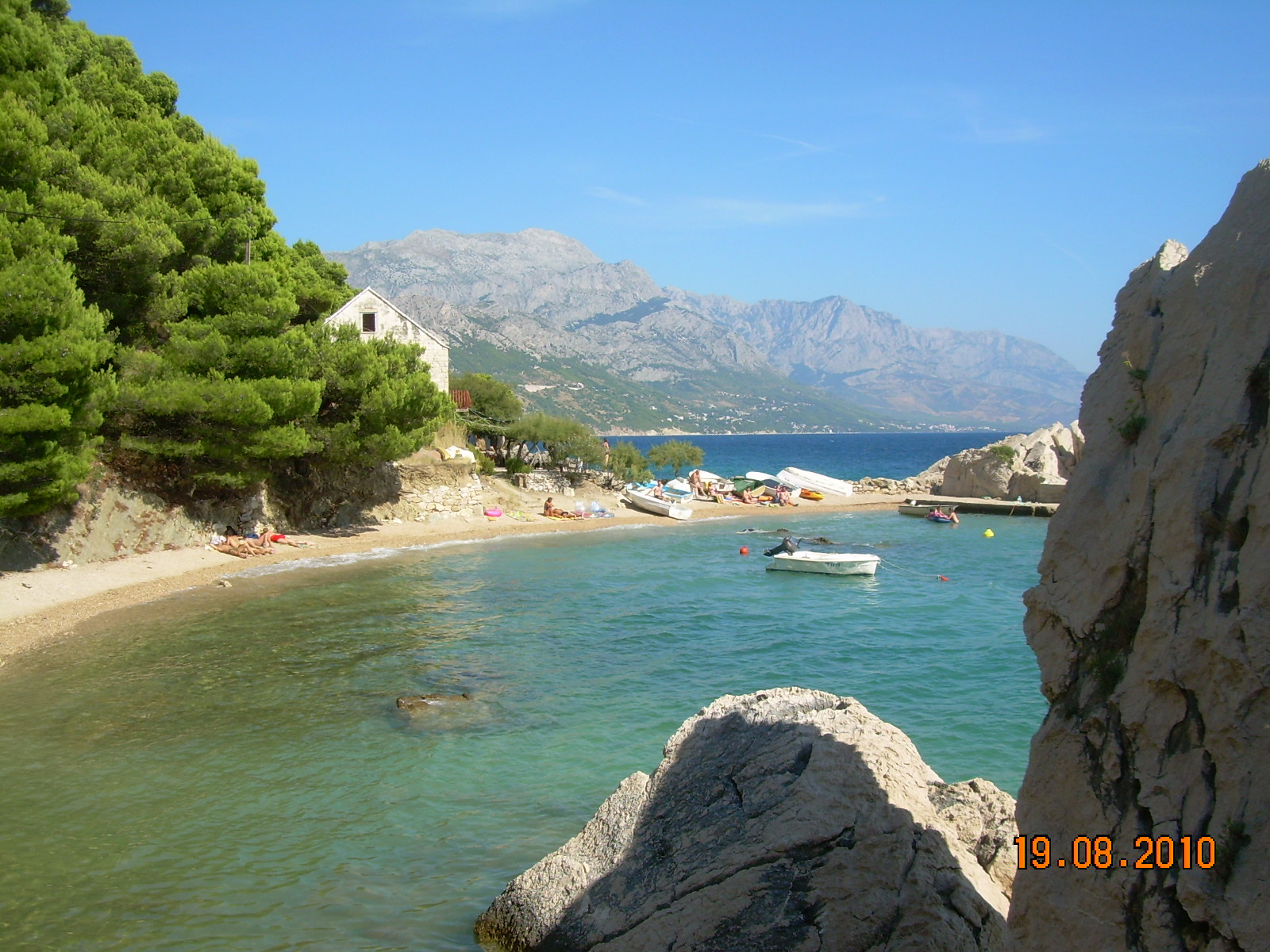 Omiš Marusici